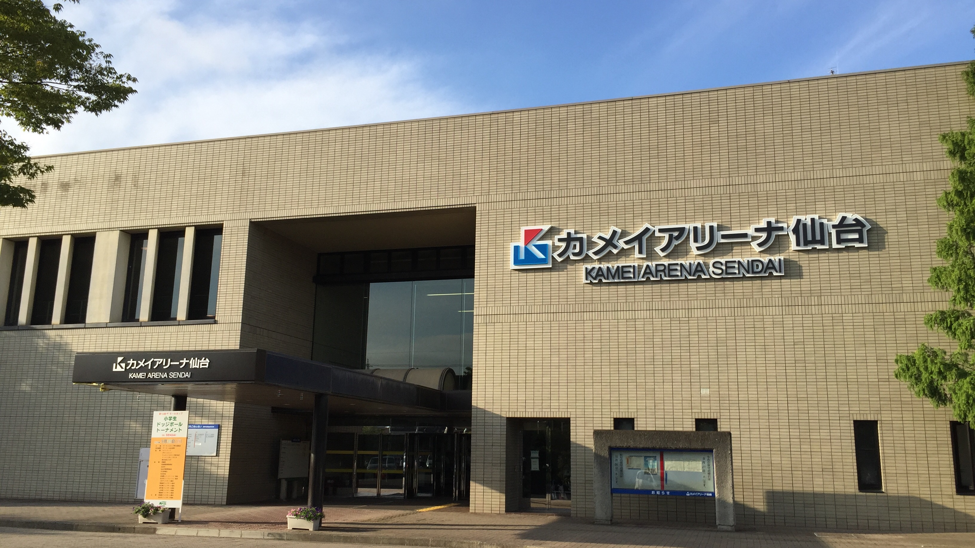 カメイアリーナ仙台（仙台市体育館）